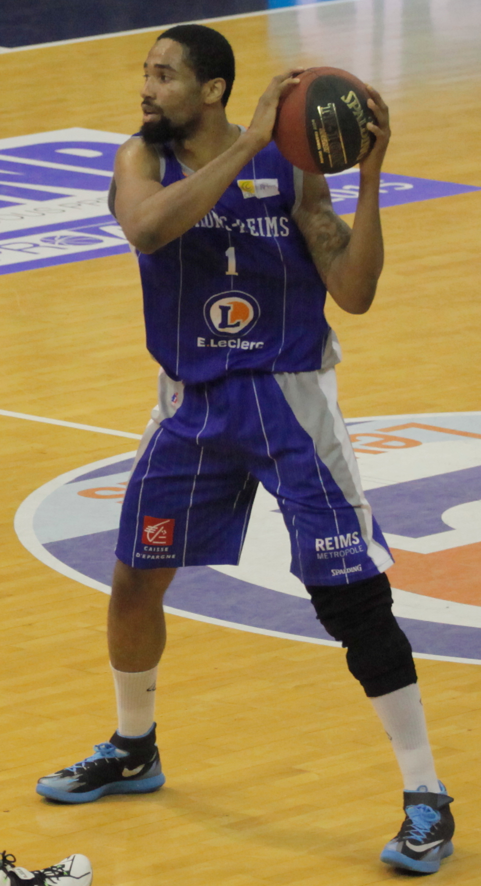 Da'sean Butler sous les couleurs de Châlons-Reims